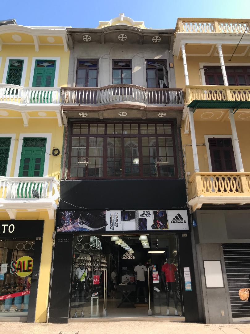 高陞大按當樓，現已改為商店